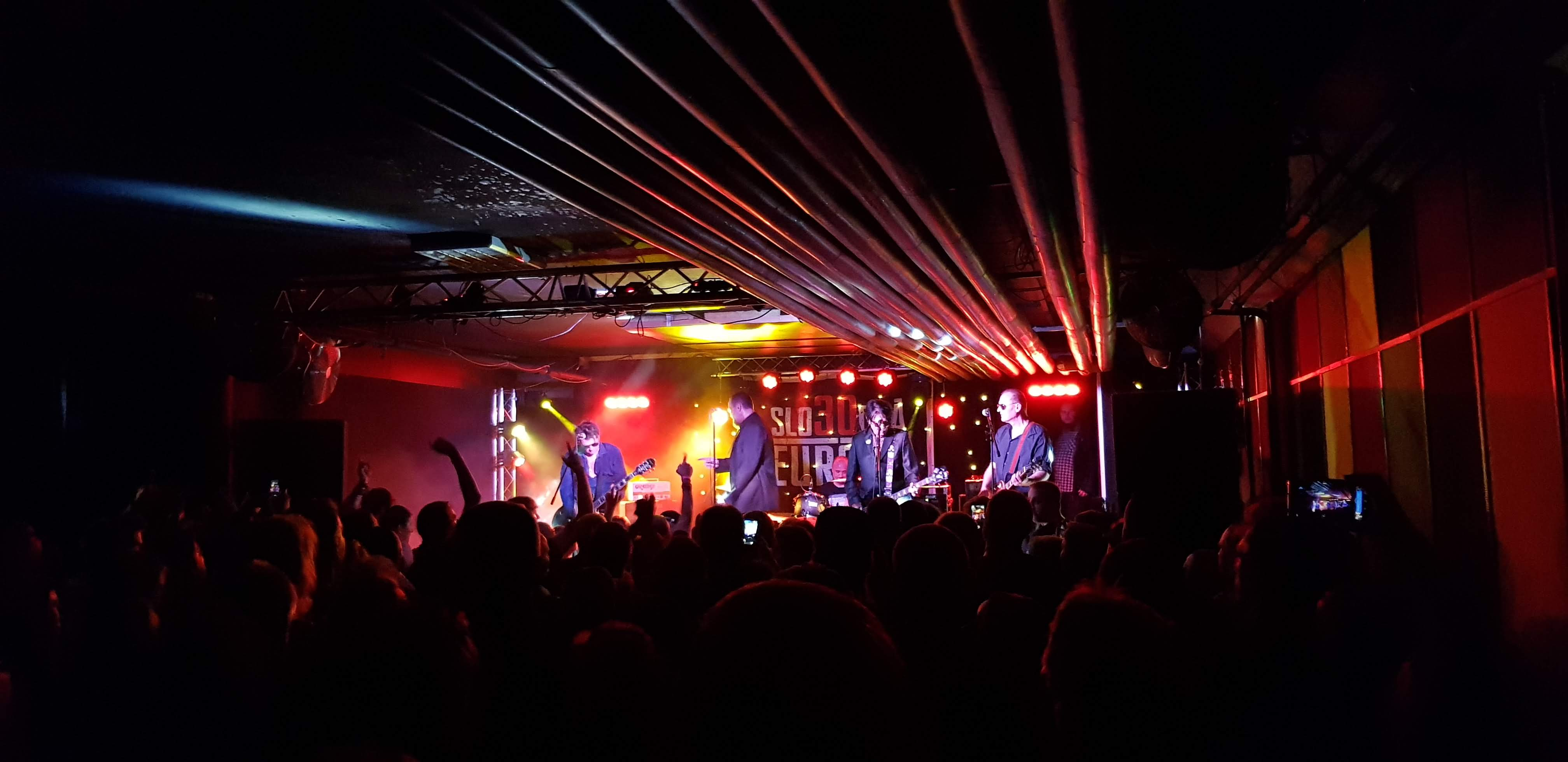 Slobodná Európa v Žiline, Smer Klub 77 Žilina. 20. 12. 2019